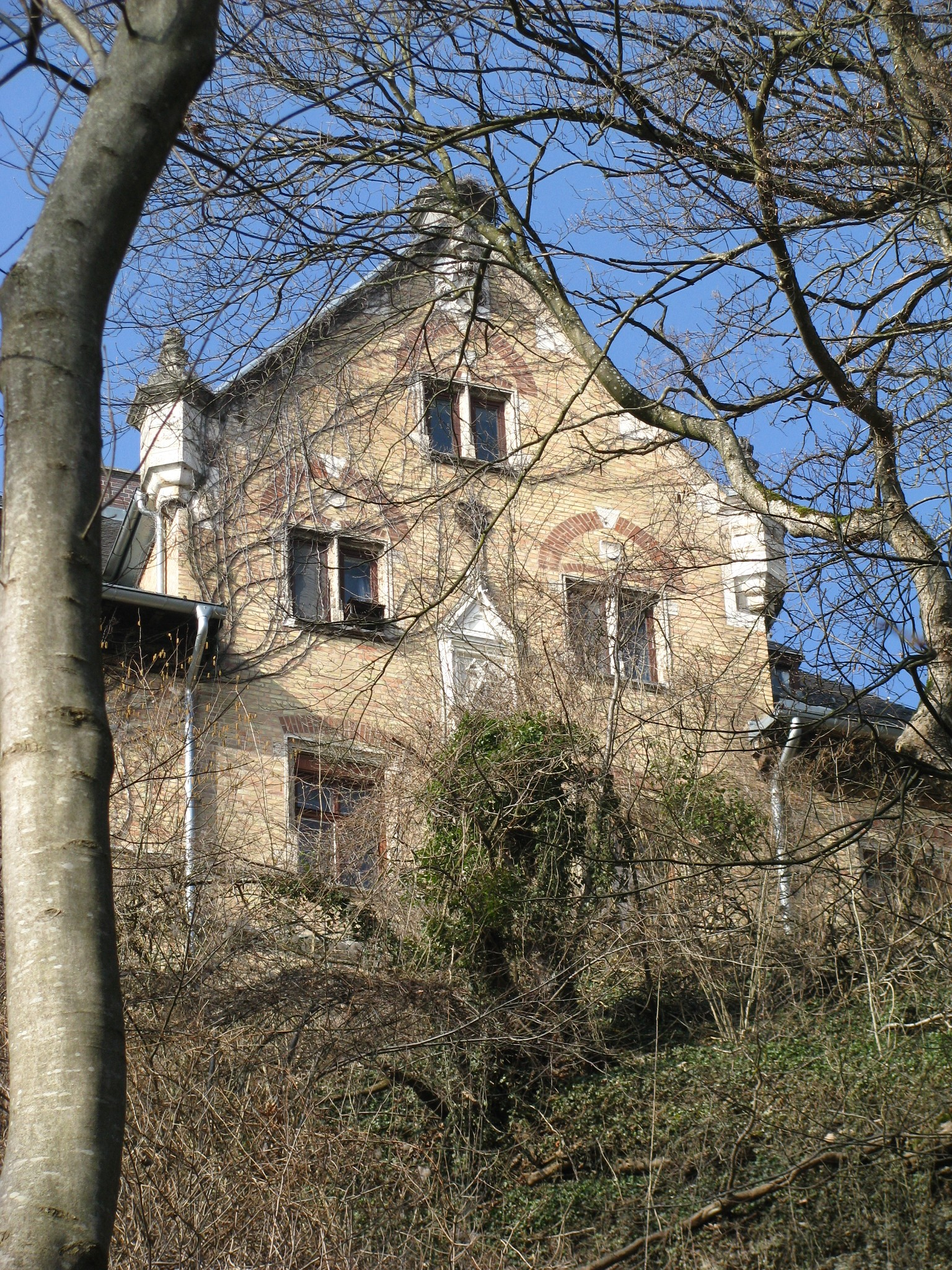 Hochschloss Pähl, Ansicht aus der Schlucht